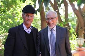 حمو النقاري (يسار الصورة) رفقة طه عبد الرحمن (يمين الصورة)